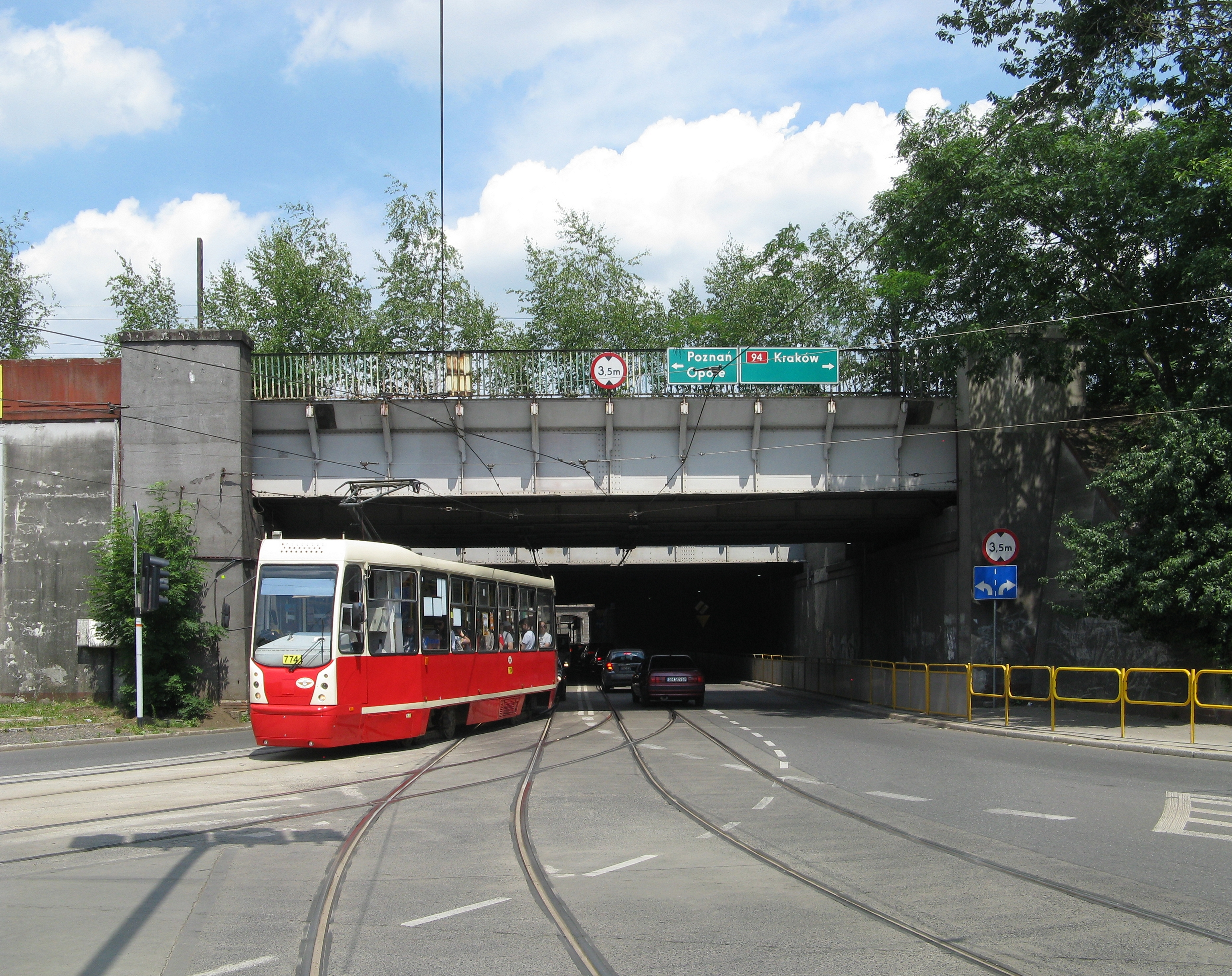 Bytom ul. Łagiewnicka, nieczynny wiadukt kolei wąskotorowej wykonany przez firmę Beuchelt.